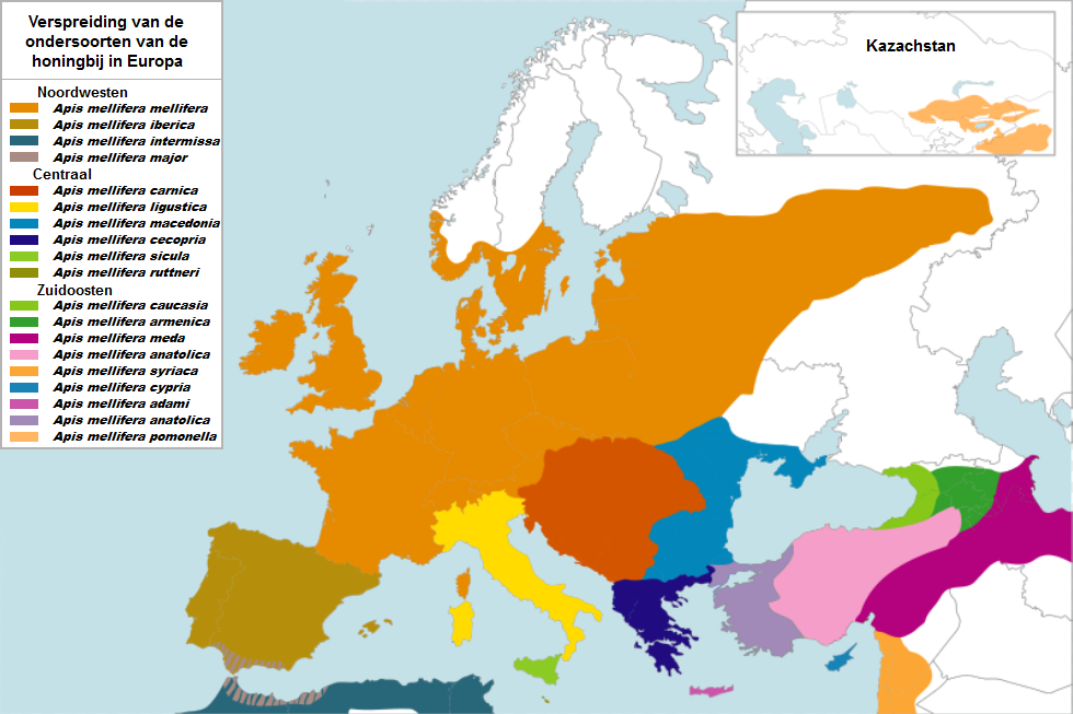 Verbreitungsgebiet der Apis Mellifera L.